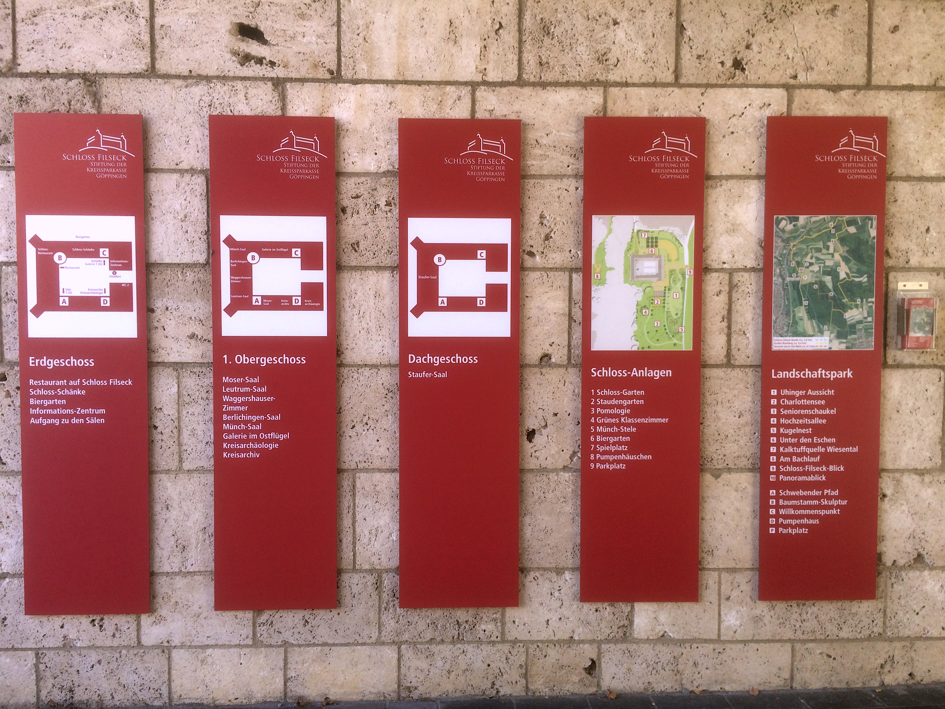 Fünf 2019 neu angebrachte Informationstafeln zur räumlichen Anlage und aktuellen Nutzung von Schloss Filseck